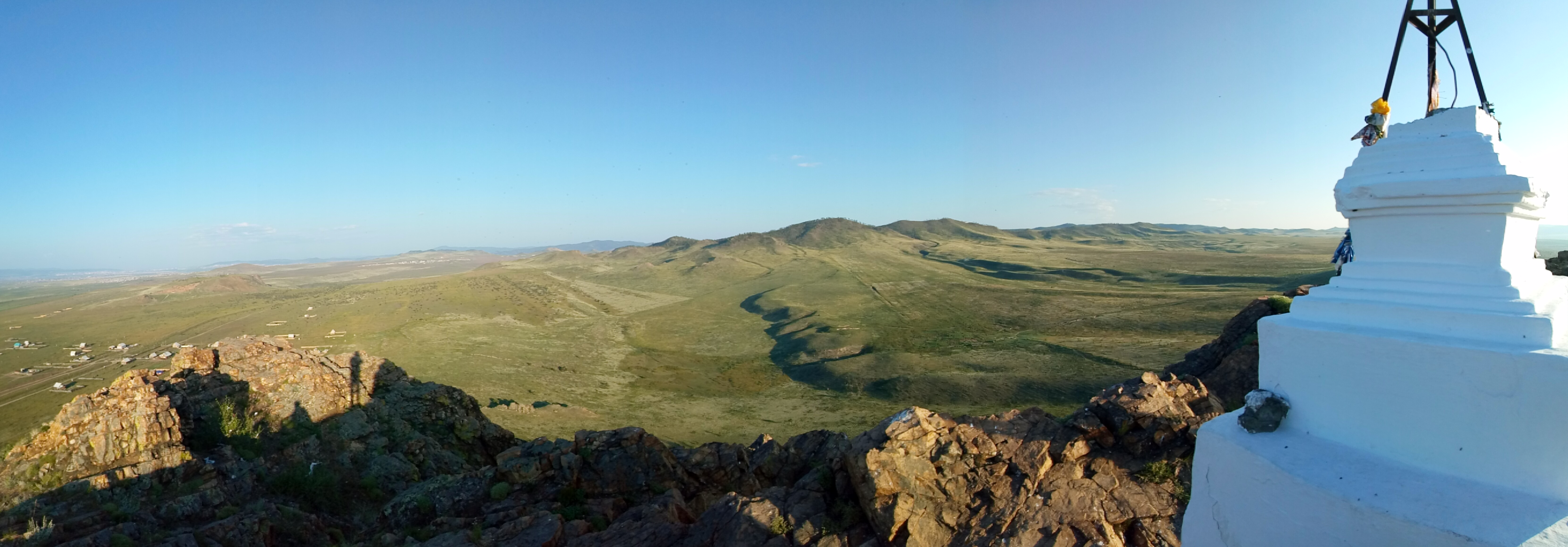 Вид на гору Даши Балбар с горы Баян Тогод